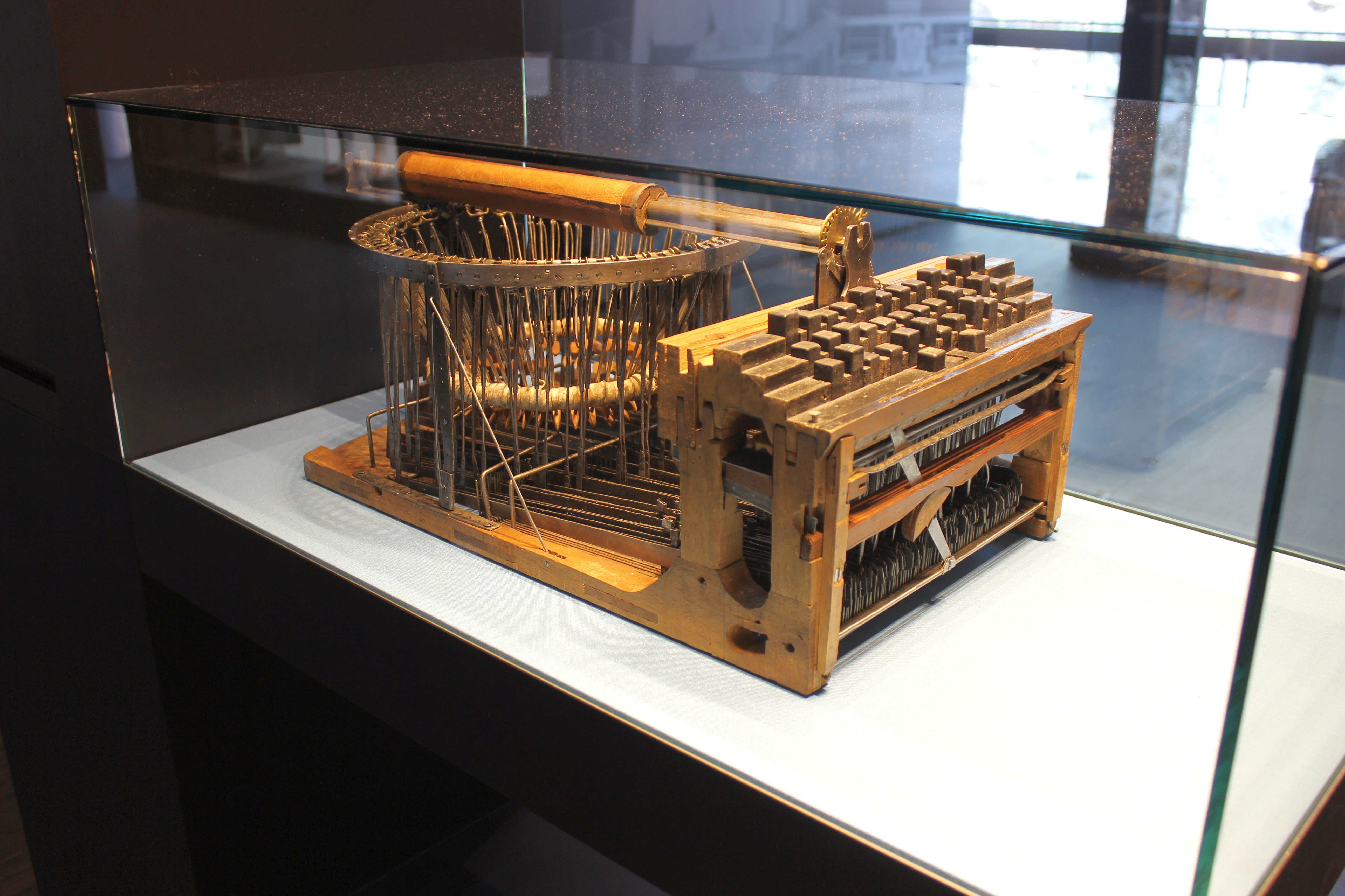 Schreibmaschine von Peter Mitterhofer, Modell Meran